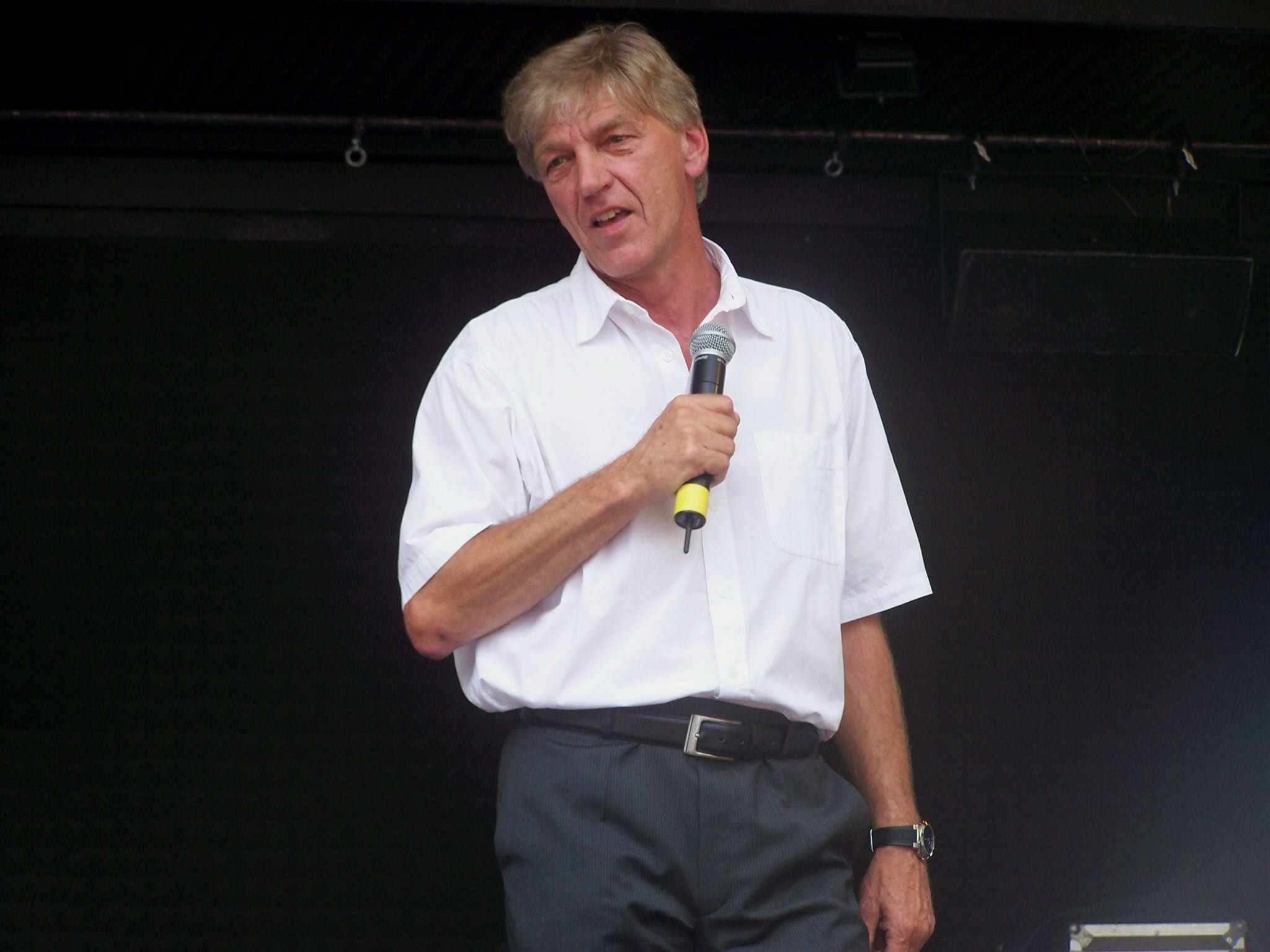 Jürgen Renfordt bei seinem Auftritt auf dem NRW-Tag 2009 in Hamm